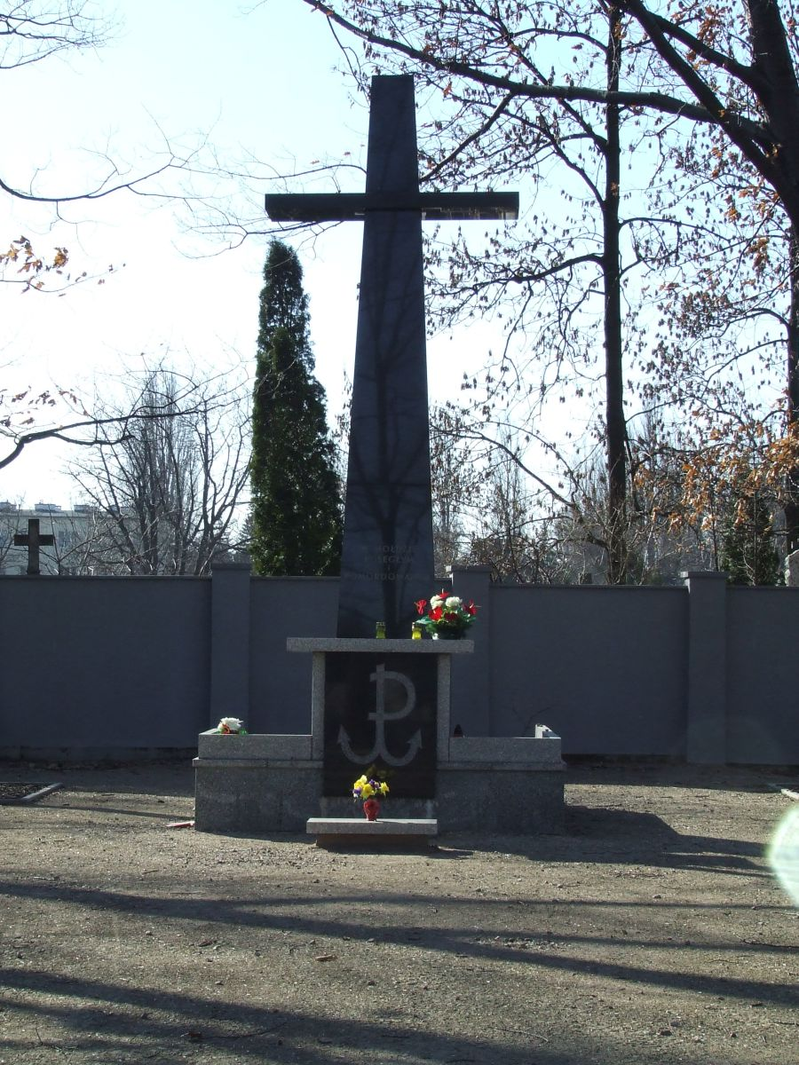 Cmentarz Powstańców Warszawy, pomnik ku czci zabitych